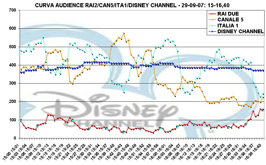 Gli ascolti su Disney Channel Italia del 29 settembre 2007 per la prima tv di high school musical 2. Preso da tvblog.